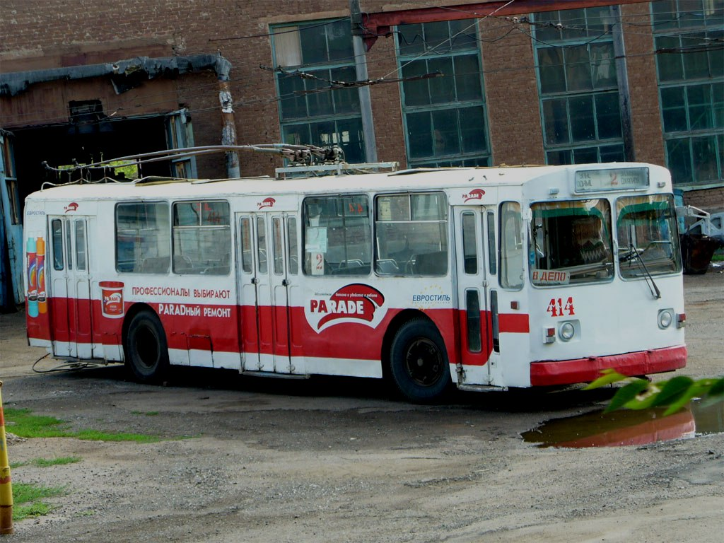 Троллейбус ЗиУ-682 №414 на территории депо в Оренбурге.